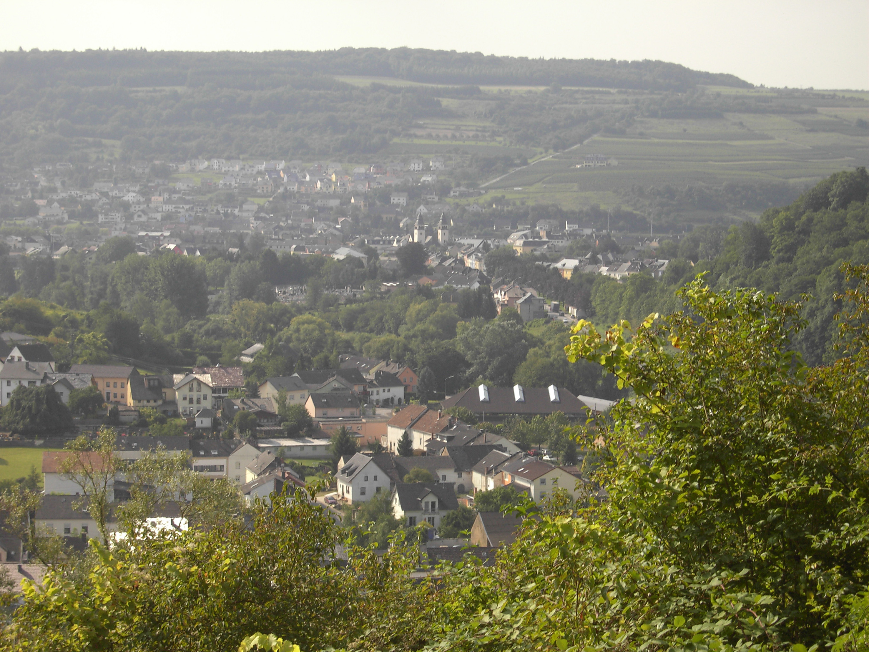 Wasserbillig - Luxembourg